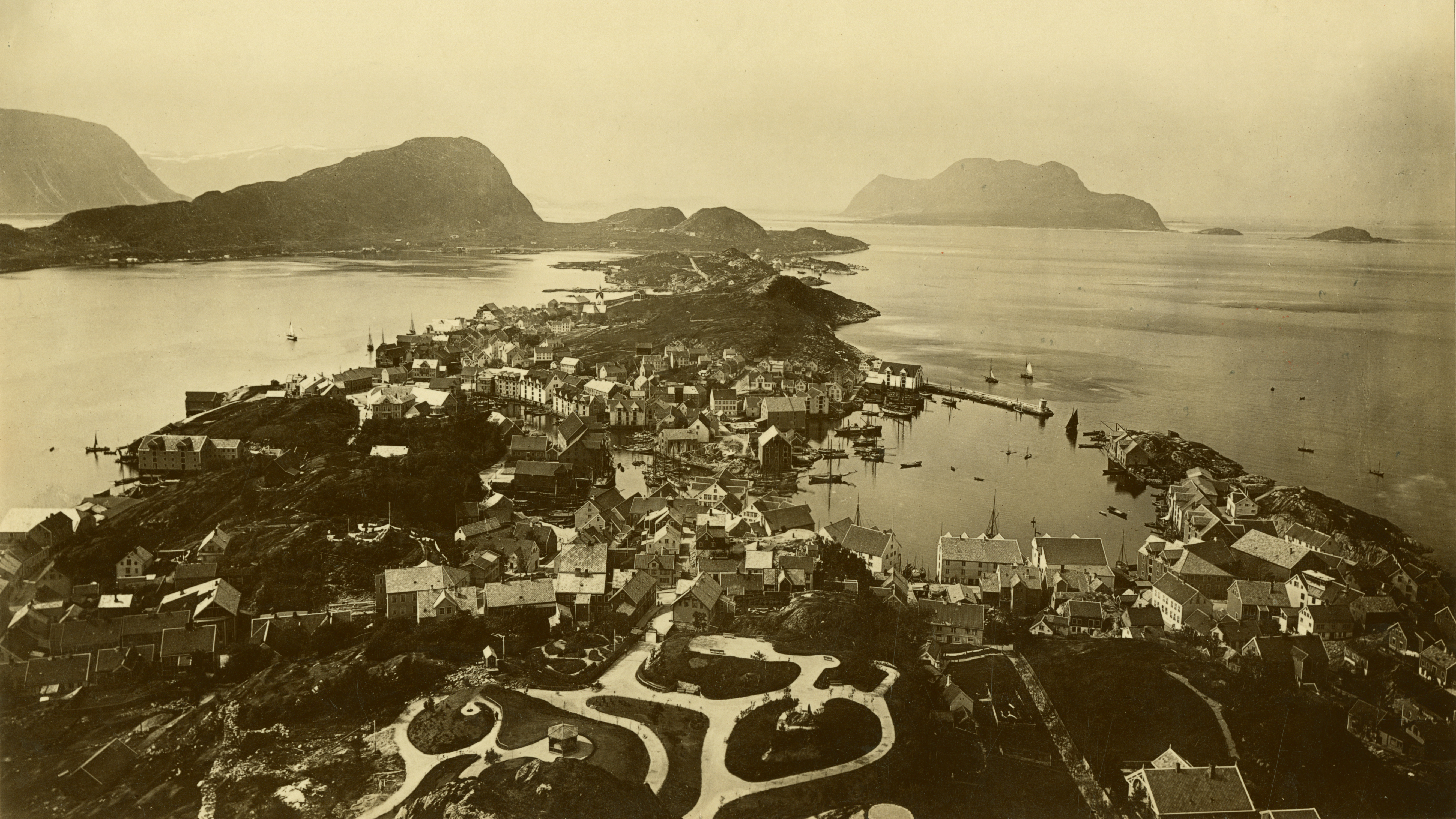 Ålesund, Møre og Romsdal